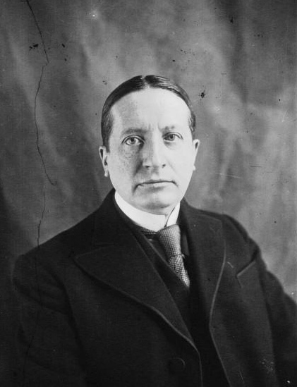 Portrait de Georges Mandel, député de la Gironde.